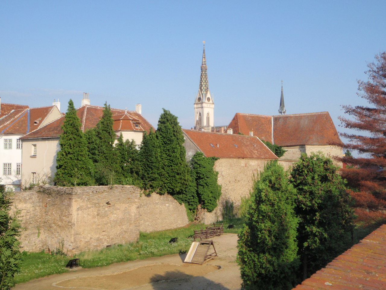 Güns Stadtmauer und Zwinger